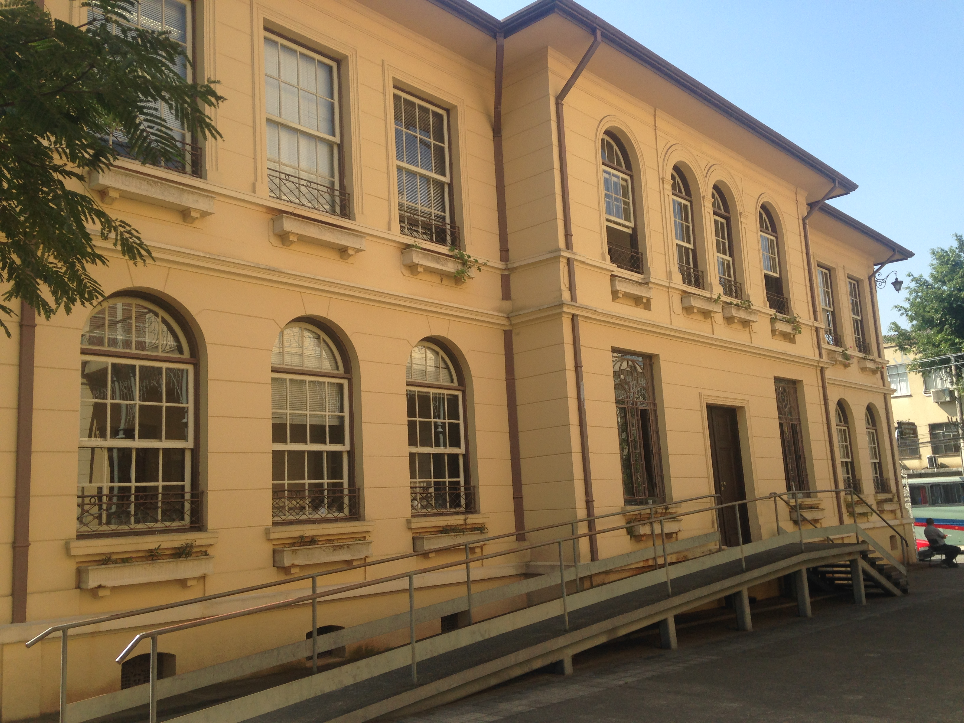 Fachada lateral Residência vizinha ao Casarão Alameda Cleveland, São Paulo Brasil.